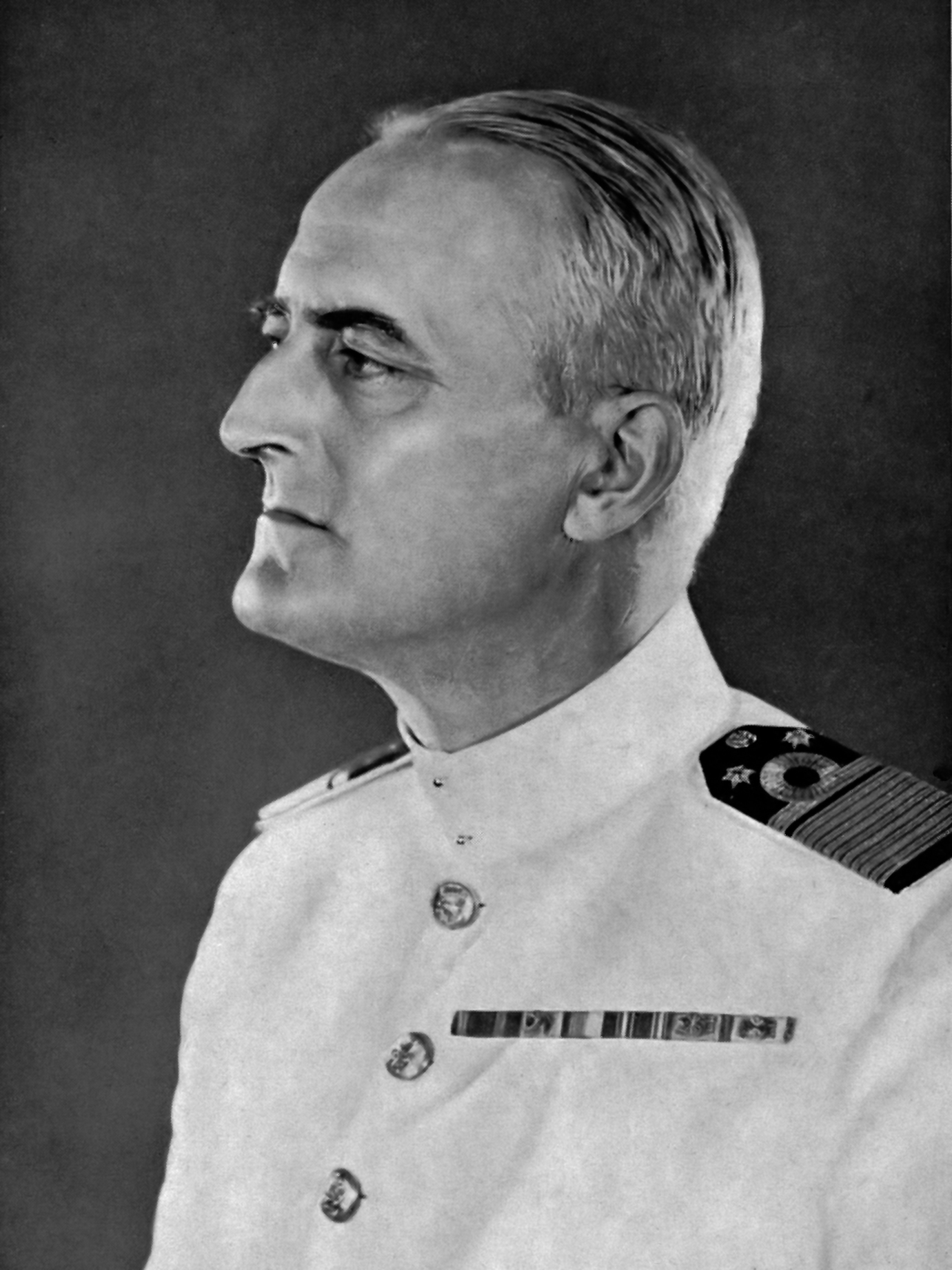 Schout-bij-nacht M.H. (Maarten Hendrik) van Dulm 17 februari 1948